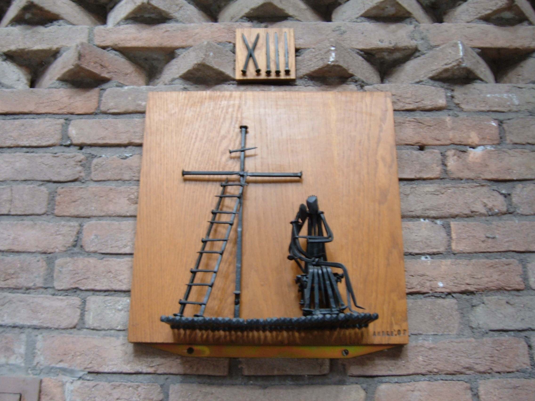 Chiesa di San Policarpo, a Roma, nel quartiere Appio Claudio. Via Crucis : XIII stazione.